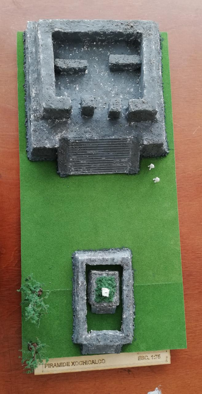 Escala 1:75